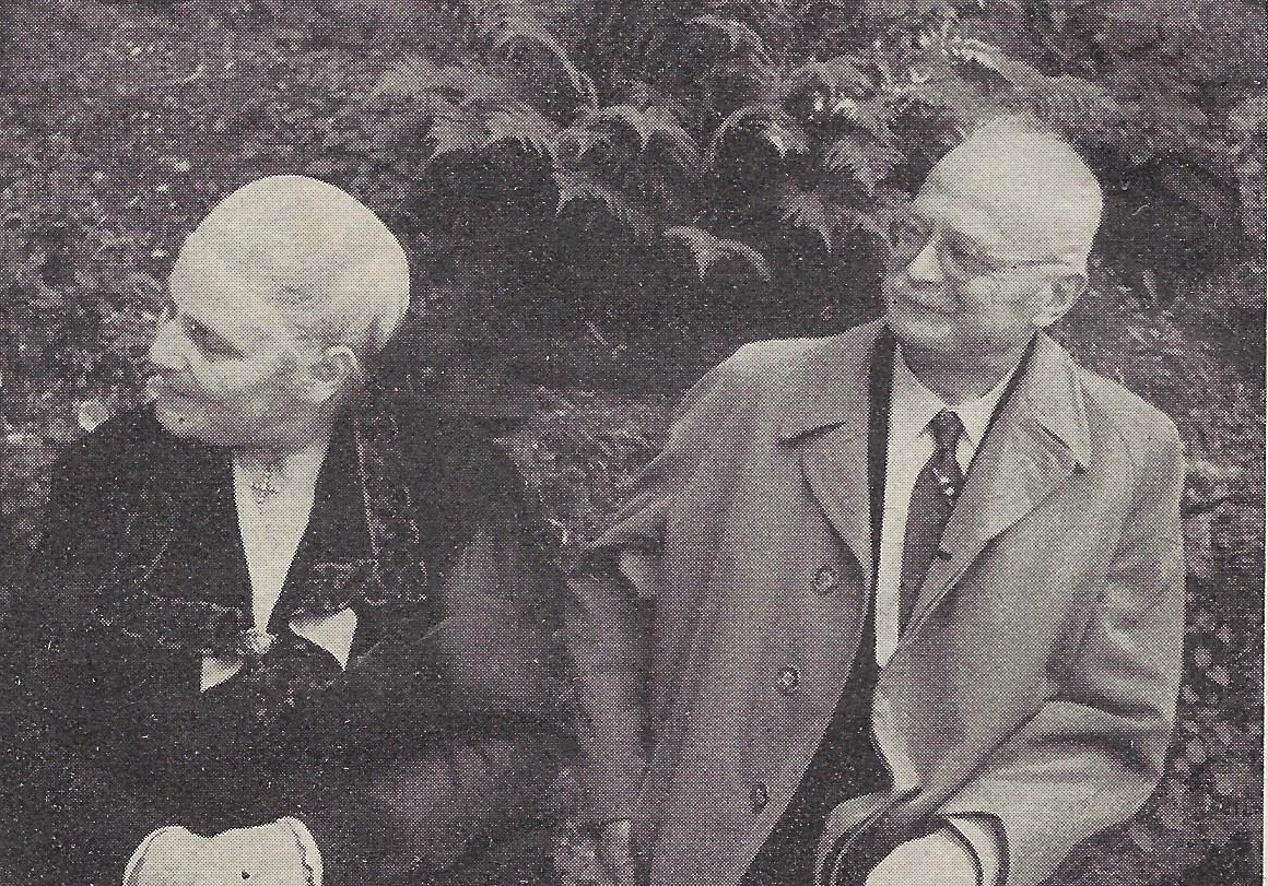 Fotografie von Erna Hoffmann, der Witwe von Friedrich Hoffmann, und Götz von Selle, dem letzten Rektor der Albertus-Universität Königsberg.